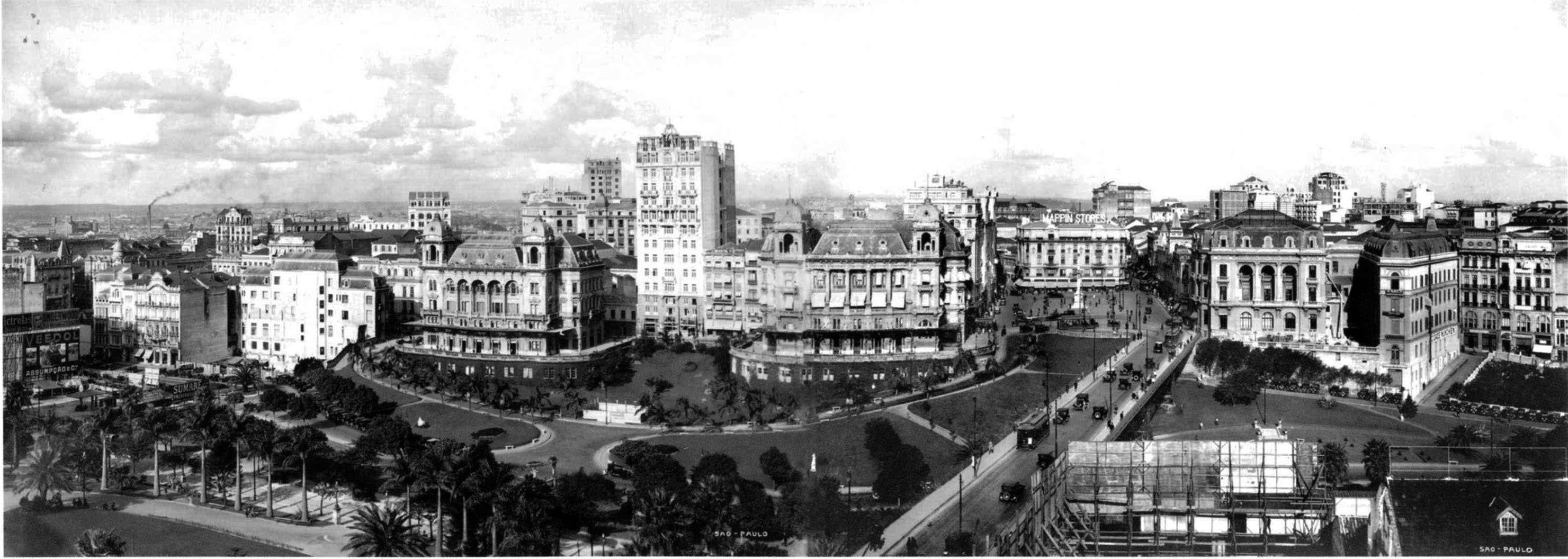 Vista do Parque do Anhangabaú e seu belíssimo conjunto arquitetônico. Foto da segunda metade da década de 1920. Autoria Desconhecida – Retirada do Livro SP 450 Anos